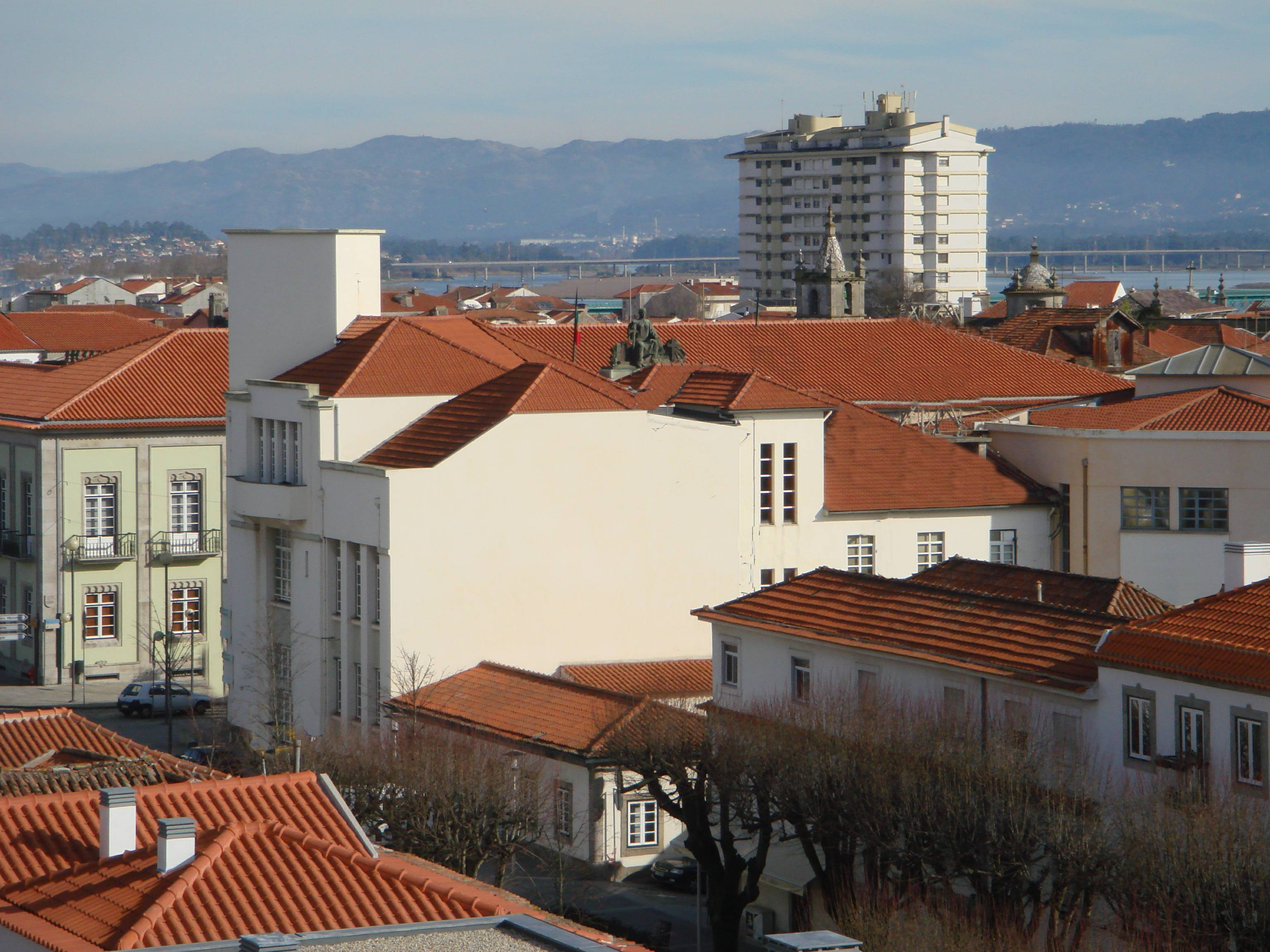 Coutinho Building over Viana do Castelo, Portugal